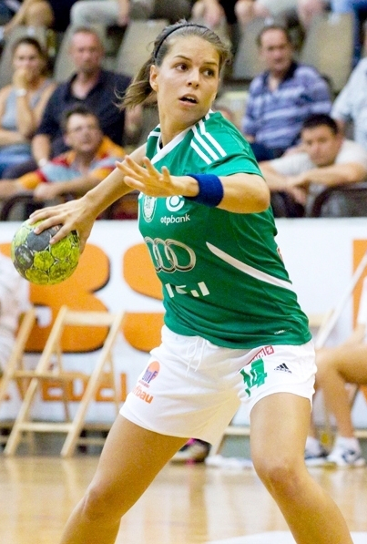 Anikó Kovacsics